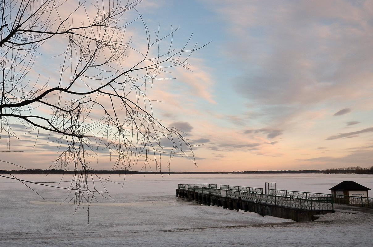 Ķīšezers, Mežaparks, Riga